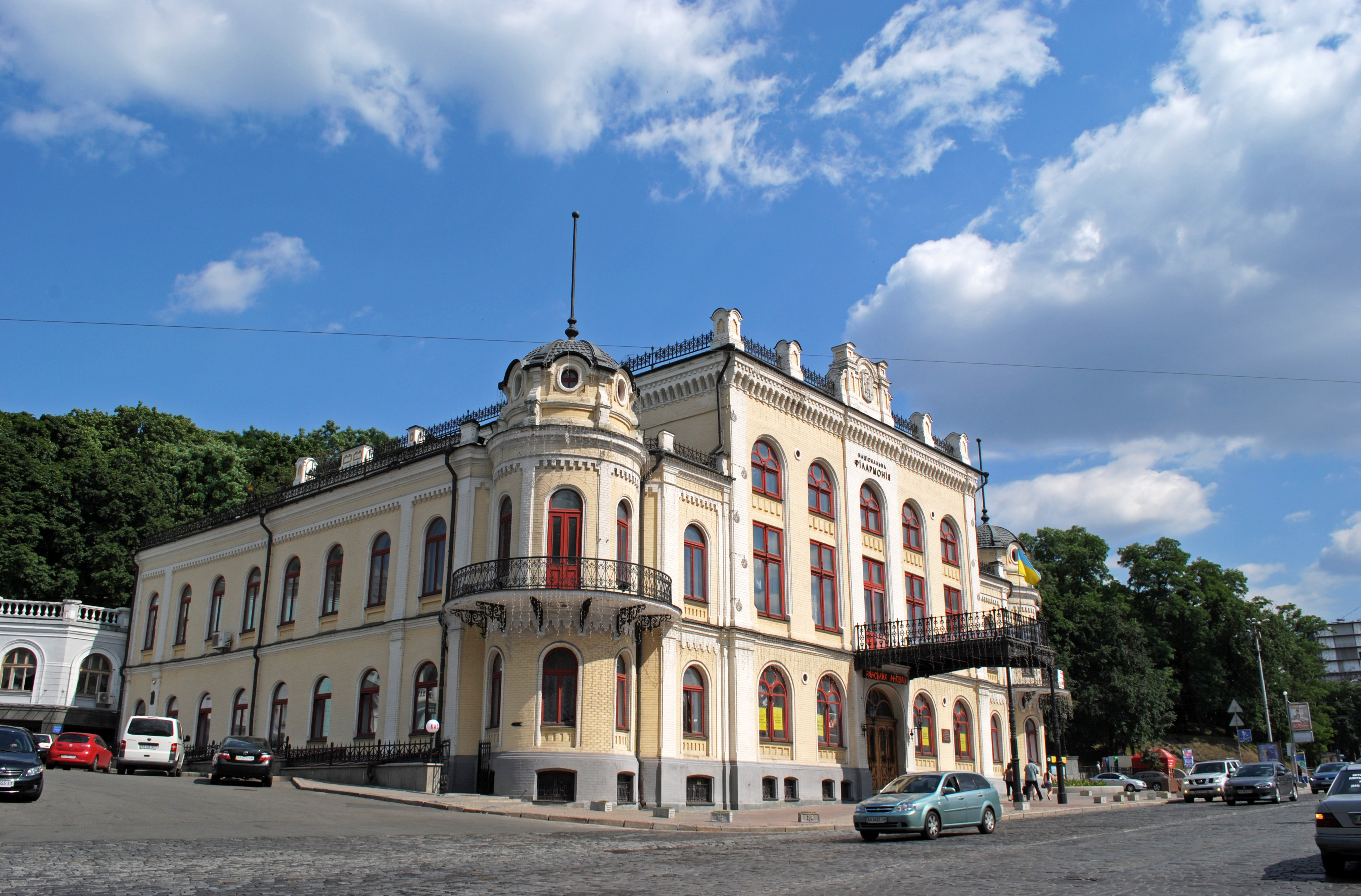 Будинок Купецького зібрання (Національна філармонія), Київ, Володимирський узвіз, 2